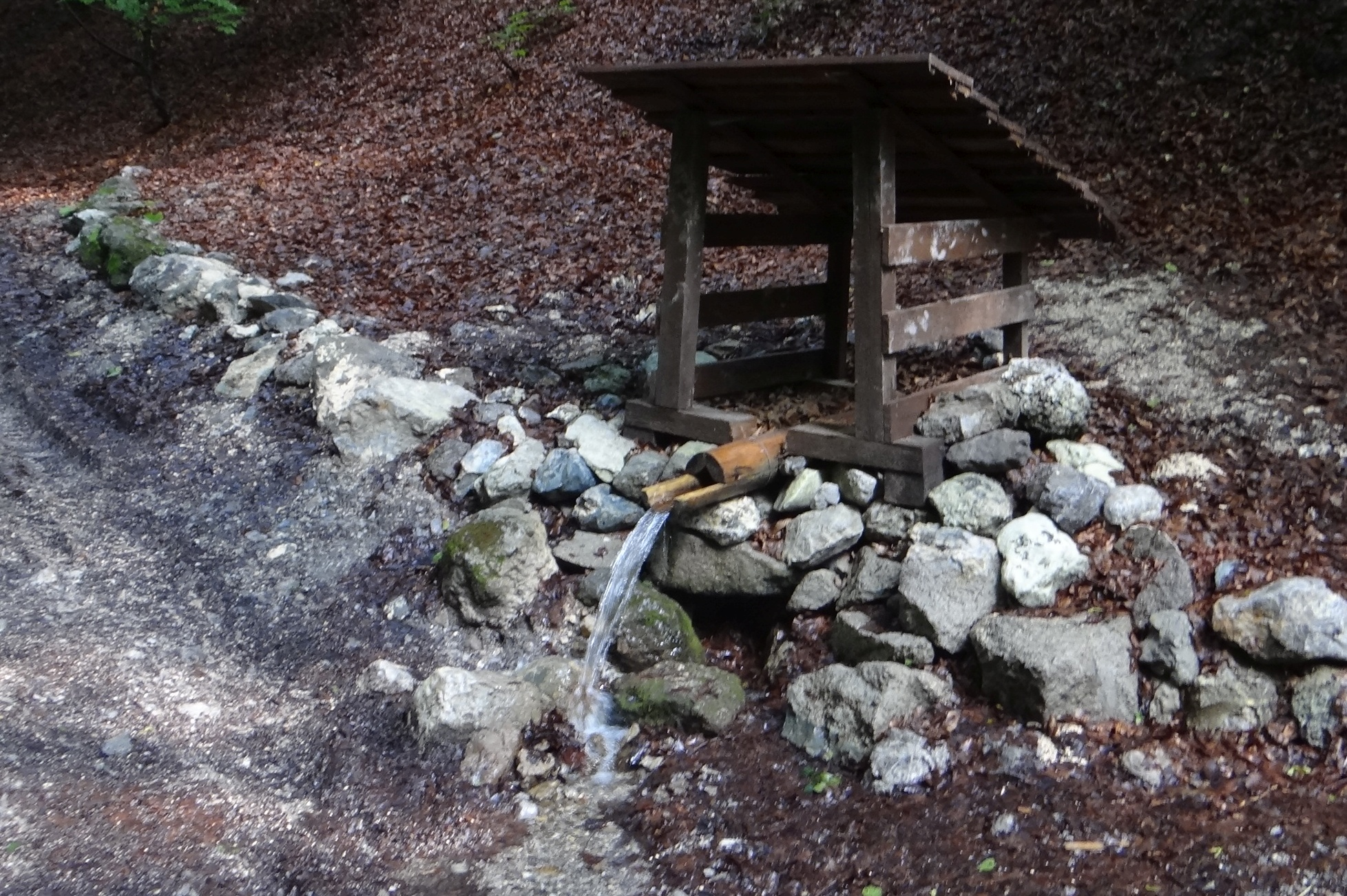 Dolina Rakytov w Harmanecu (Wielka Fatra). Jedno ze źródeł potoku Rakytov